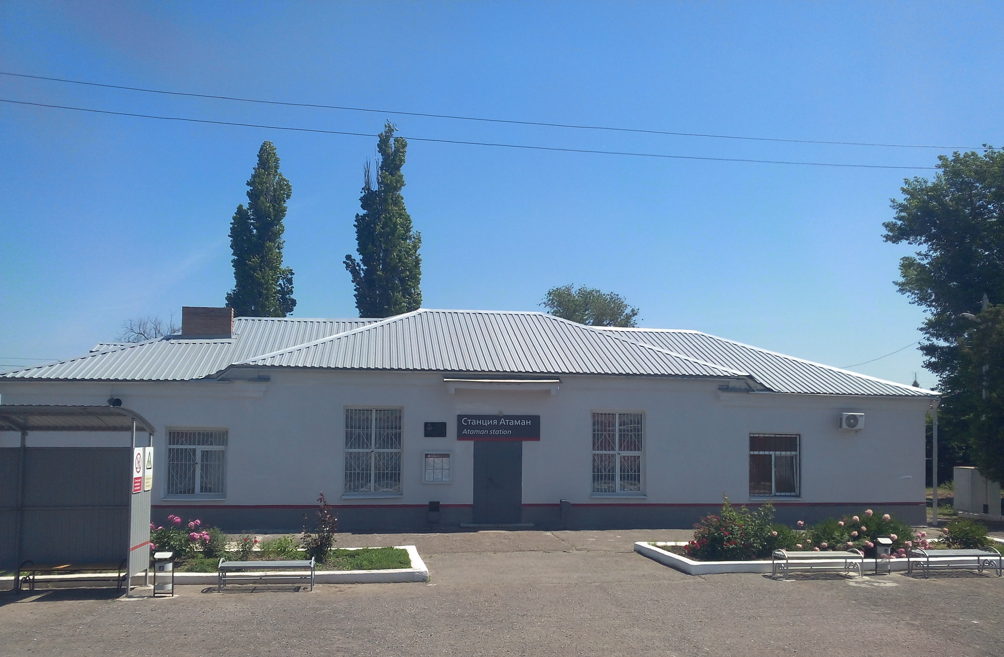 ж.д. вокзал станции Атаман СКЖД (станица Егорлыкская Ростовская область)